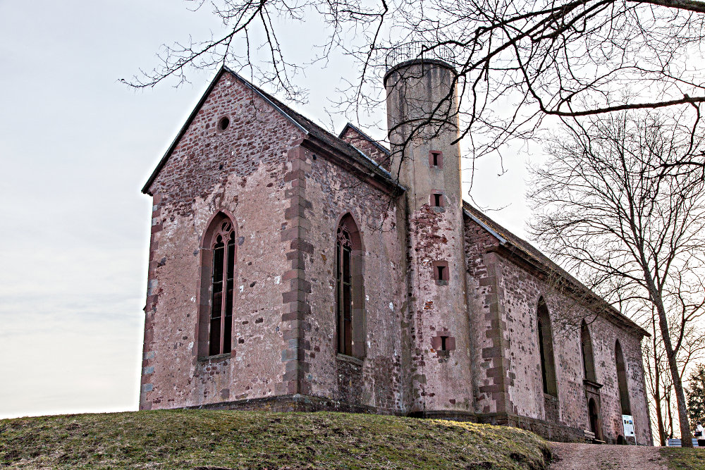 Gotthardruine in Weilbach (Bayern)